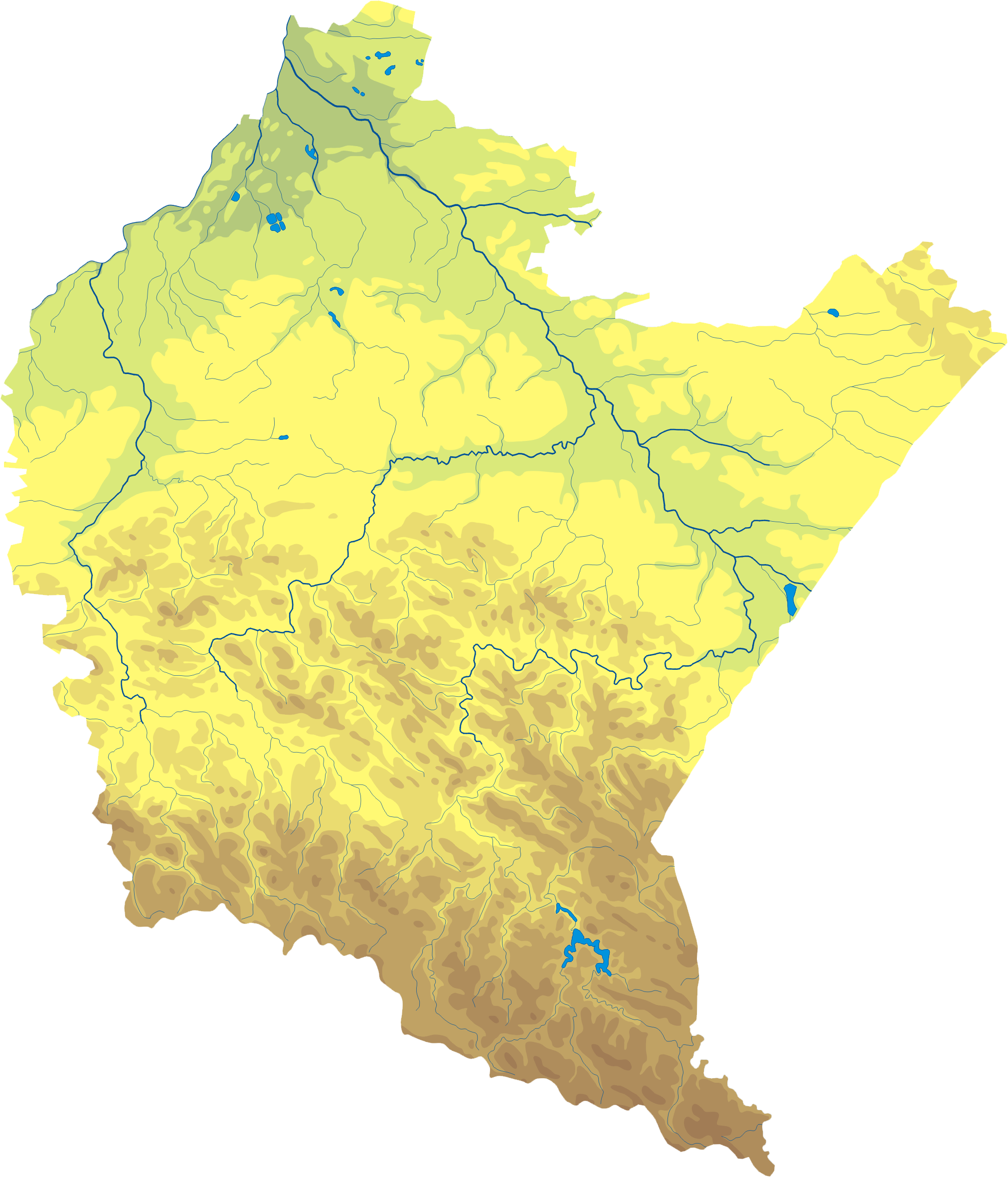 Mapa wód i ukształtowania powierzchni województwa podkarpackiego. Autor: Aotearoa Współrzędne graniczne mapy: N: 50.8205° N S: 49.0020° N W: 21.1401° E E: 23.5478° E Legenda